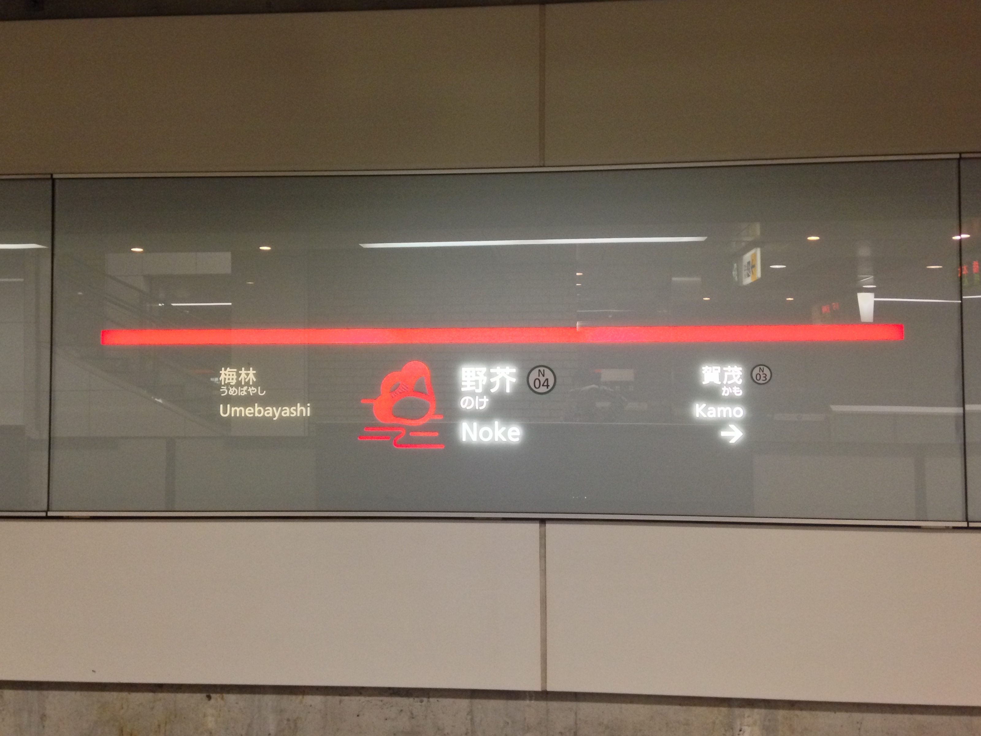 野芥駅の駅名標。イラストはツバキ